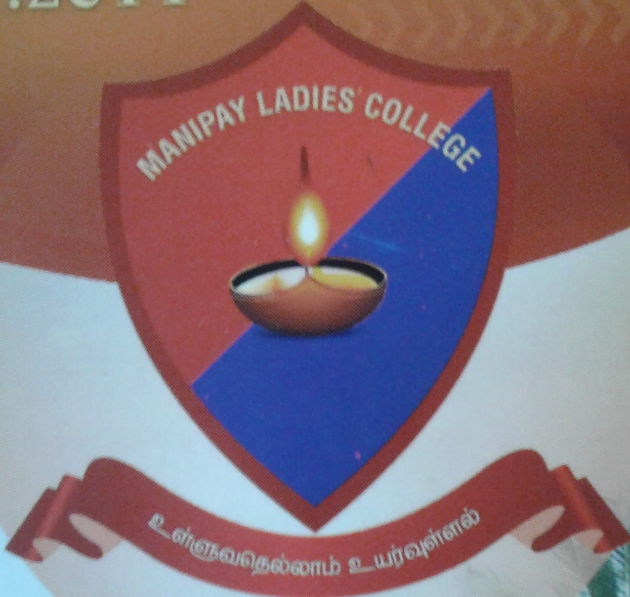 பாடசாலையின் இலட்சனை சின்னம்